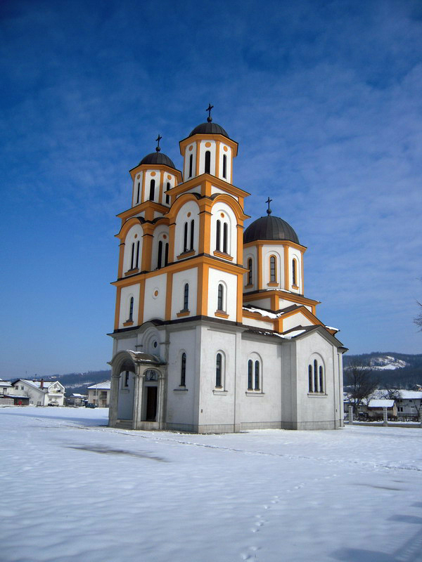 Hram Sv. sveštenomučenika Platona